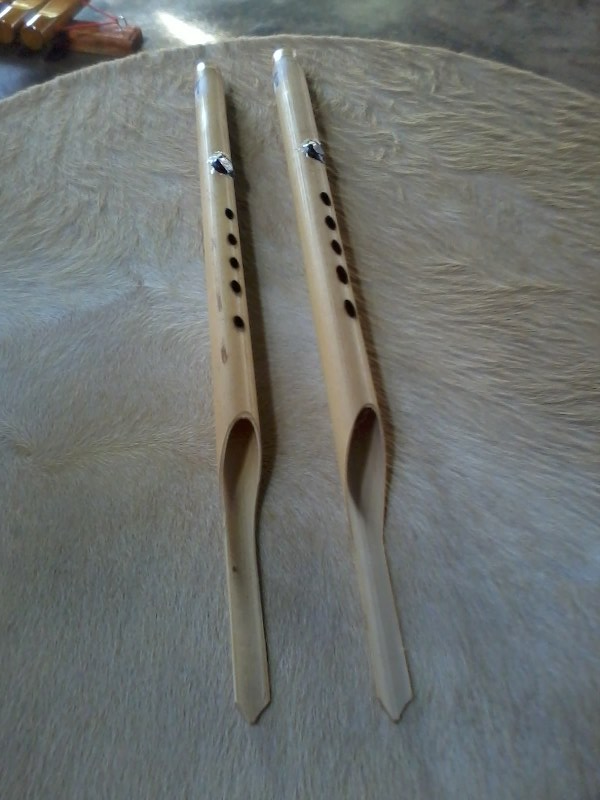 เครื่องคนตรี